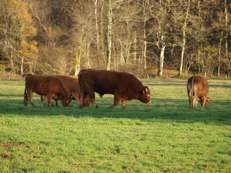 Teaureau et vaches de race limousine dans les environs de Limoges (Haute-Vienne).